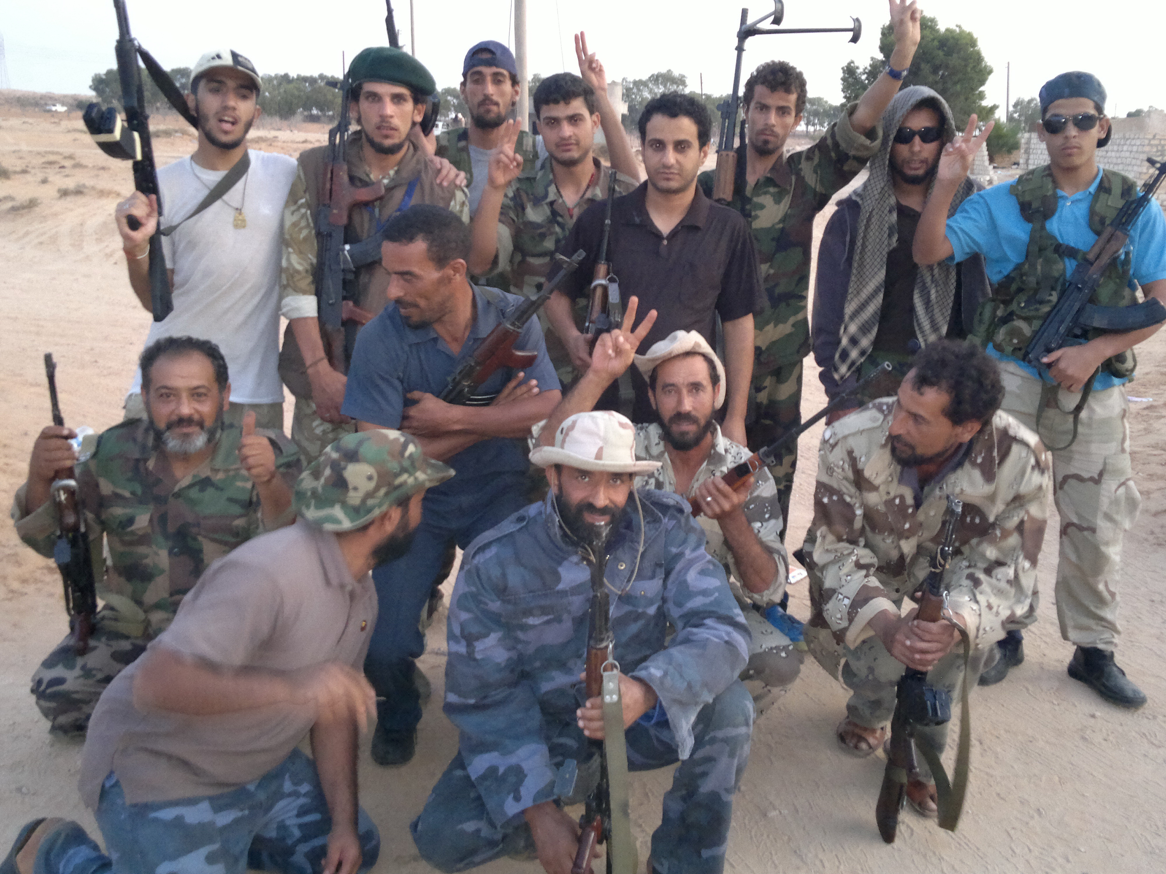 20111002121احمد سرت